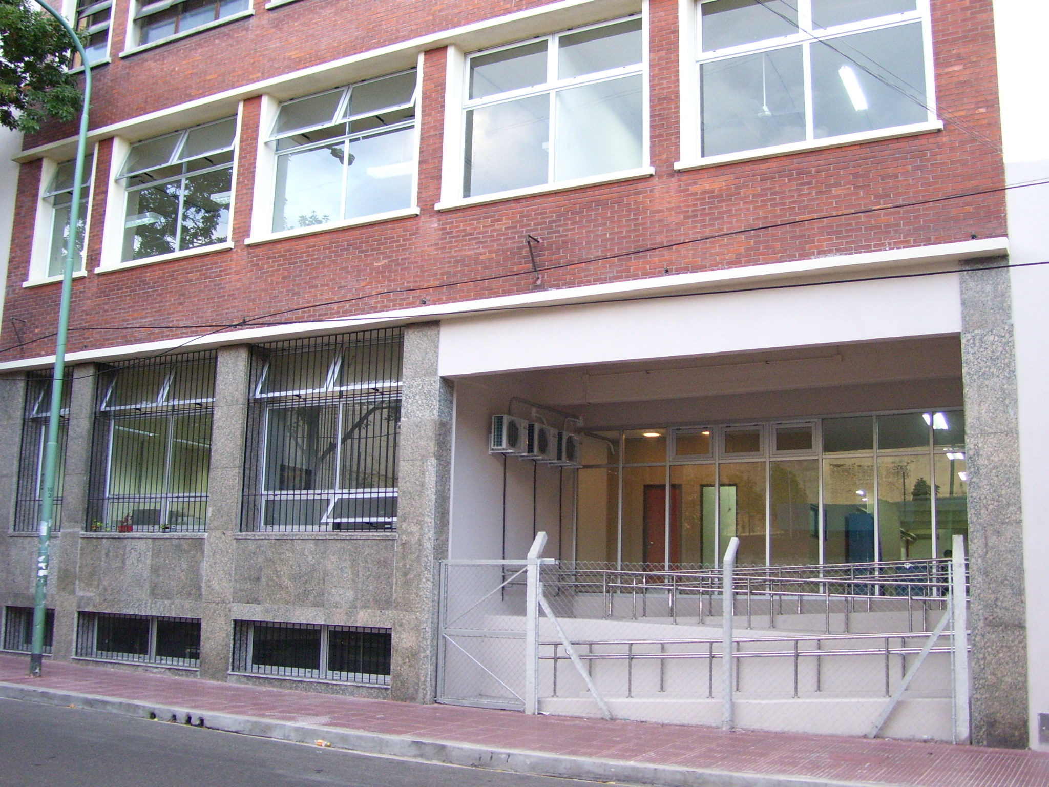 Frente del nuevo edificio de la Facultad de Ciencias Sociales de la Universidad de Buenos Aires